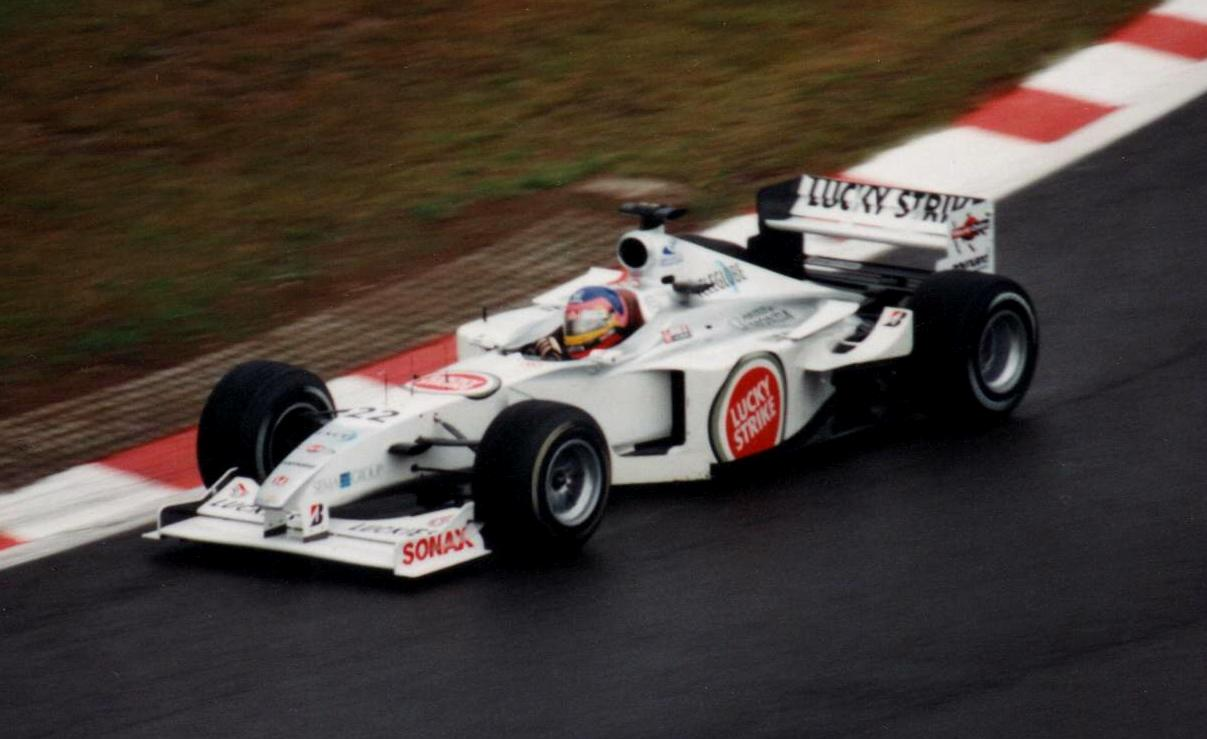 Jacques Villeneuve (BAR) at the 2000 Belgian Grand Prix